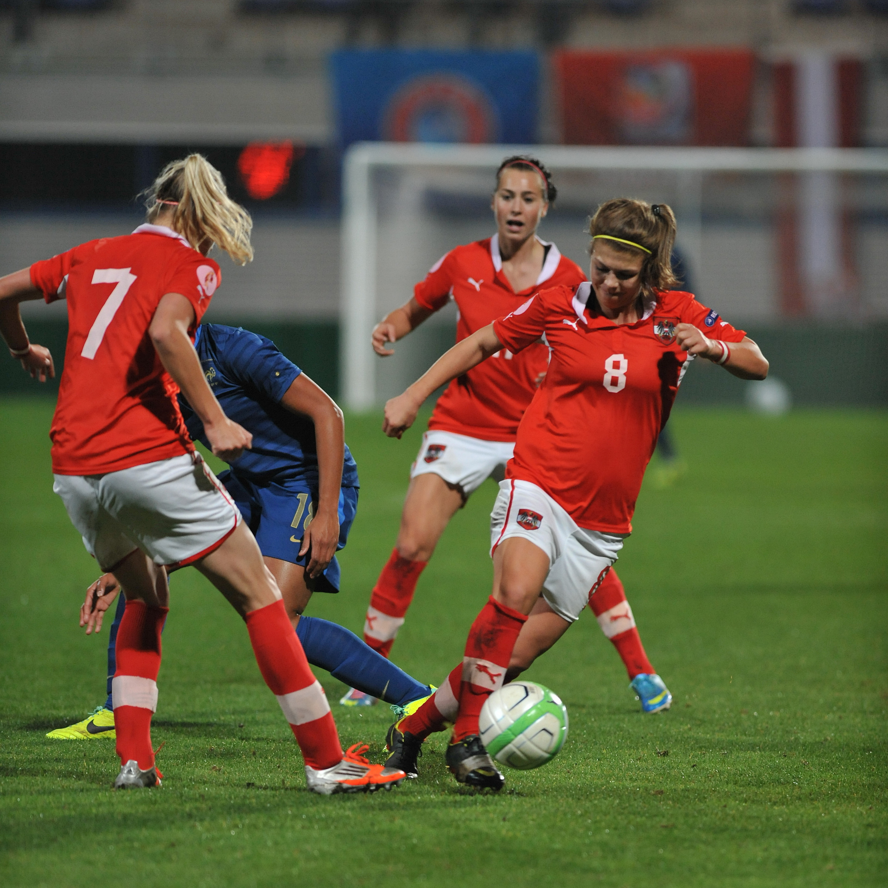 FIFA Women's World Cup 2015 Qualiying Round Österreich - Frankreich am 31. Oktober 2013 in Ritzing: Nadine Prohaska